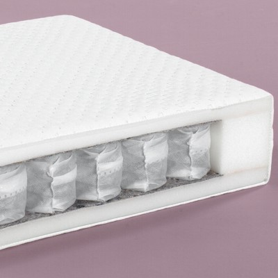 Schnitt-Taschenfederkern-Matratze